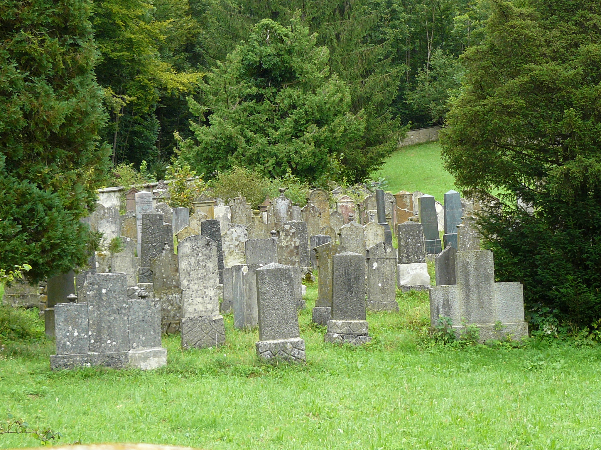 Jüdischer Friedhof im Bopfinger Ortsteil Aufhausen